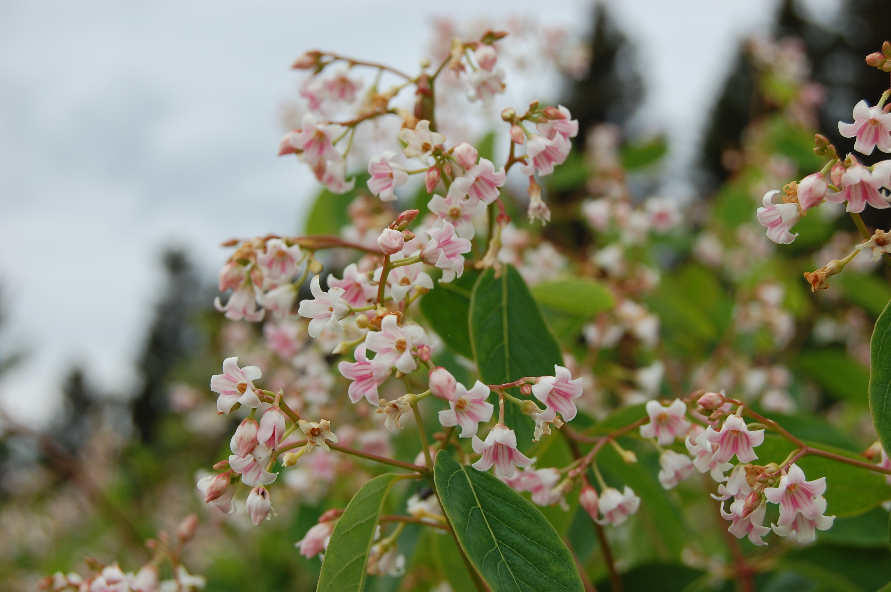 Spreading dogbane,Apocyne à feuilles d'androsème